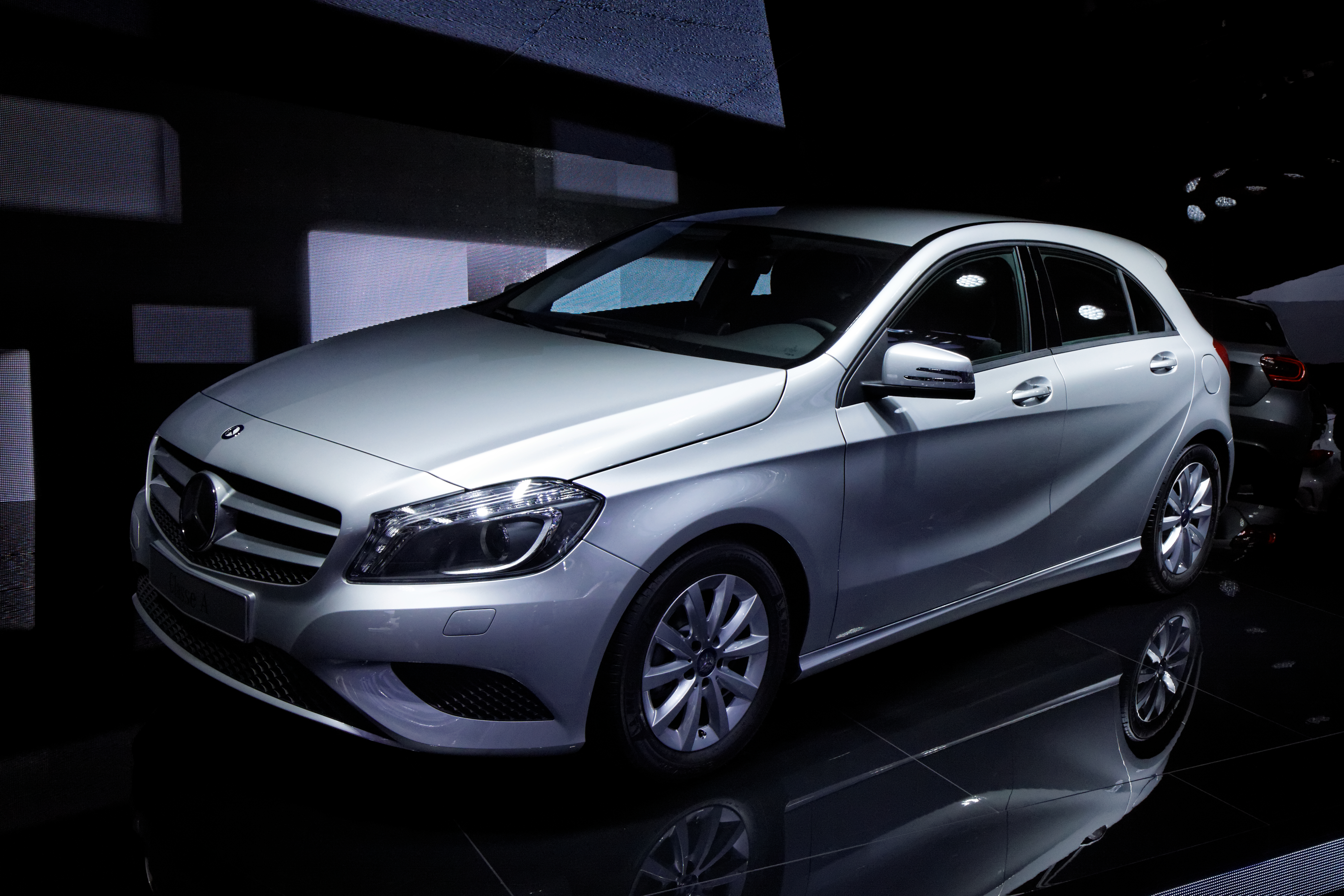 Une Mercedes Classe A présentée lors du Mondial de l'automobile de Paris 2012.